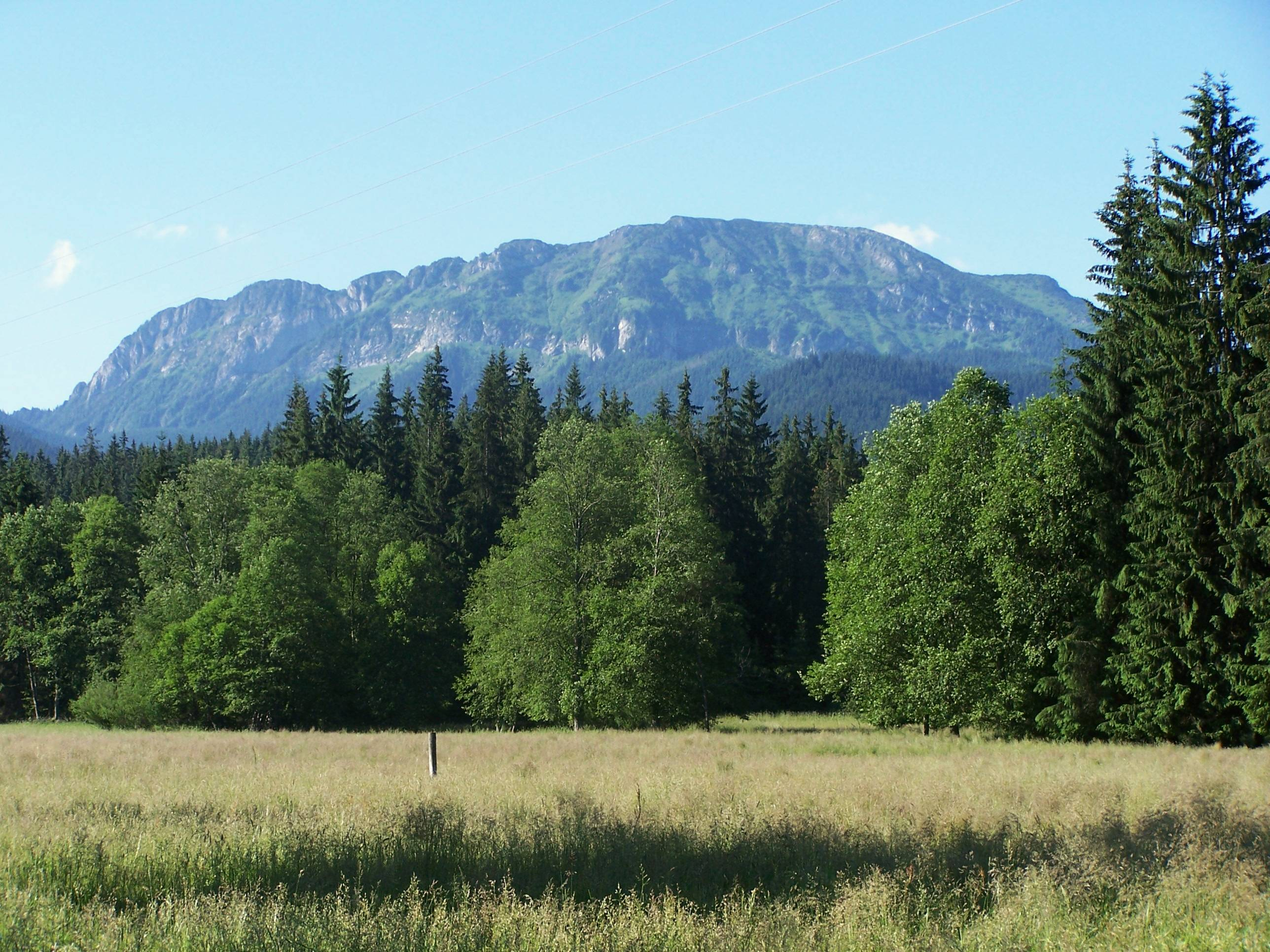 Kominiarski Wierch - widok z szosy Kościelisko-Chochołów